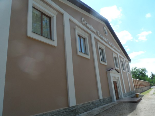 Мелитополь